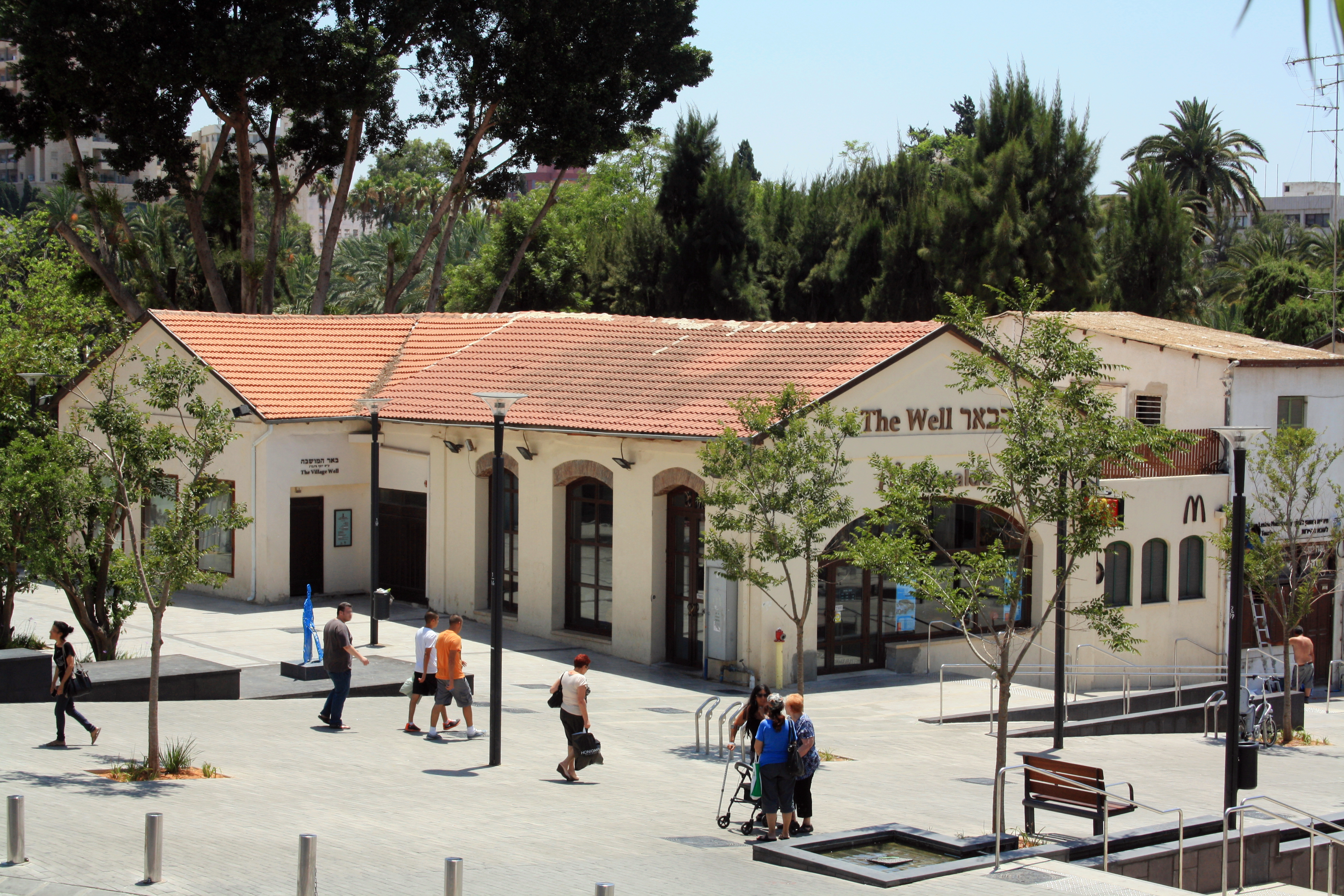 באר "מצאנו מים"', הבאר הראשונה שנחפרה בראשון ובה נמצאו מים שאפשרו את קיום המושבה.